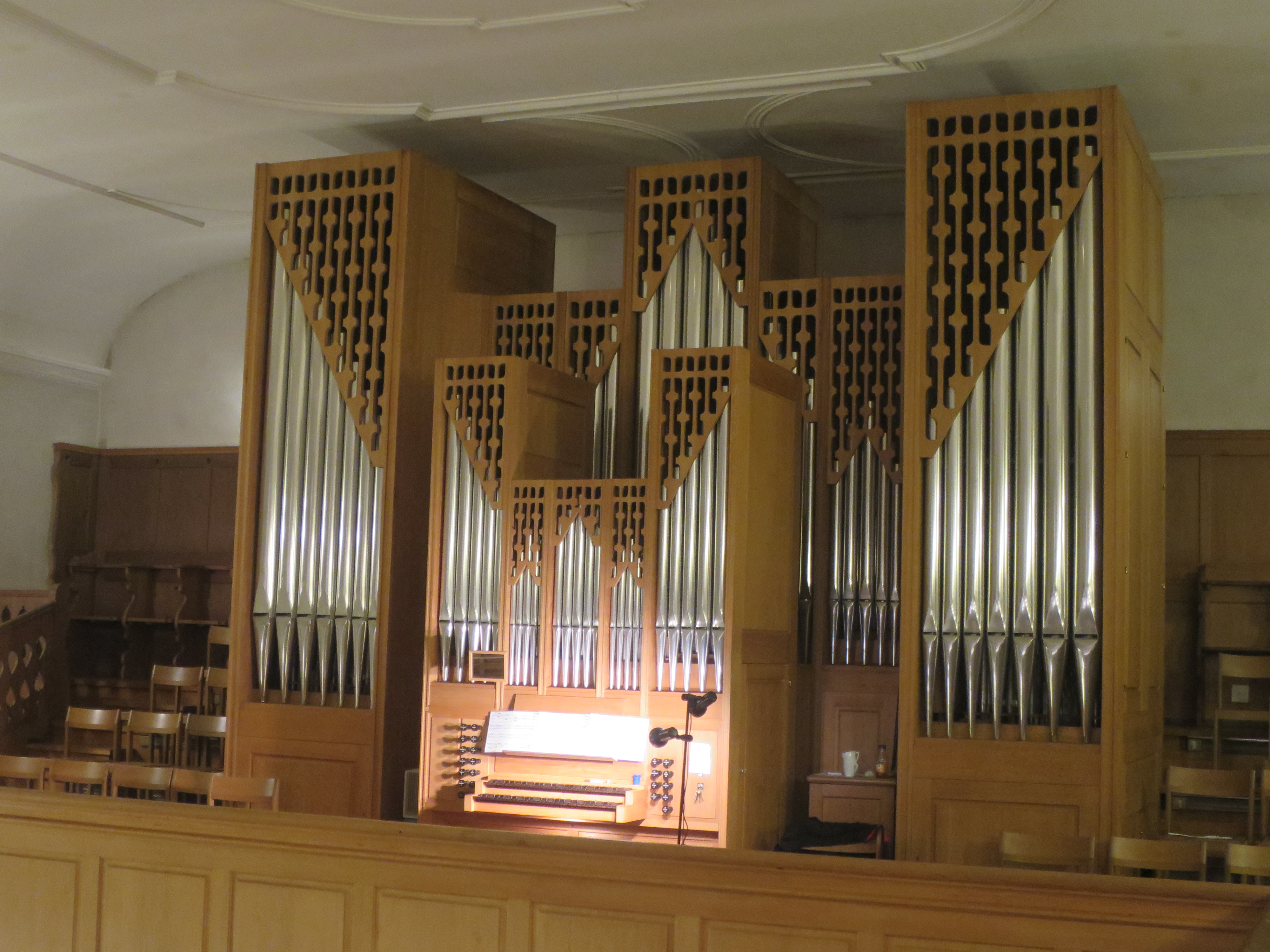 Reformierte Kirche Unterstammheim - Kuhn-Orgel von 1974